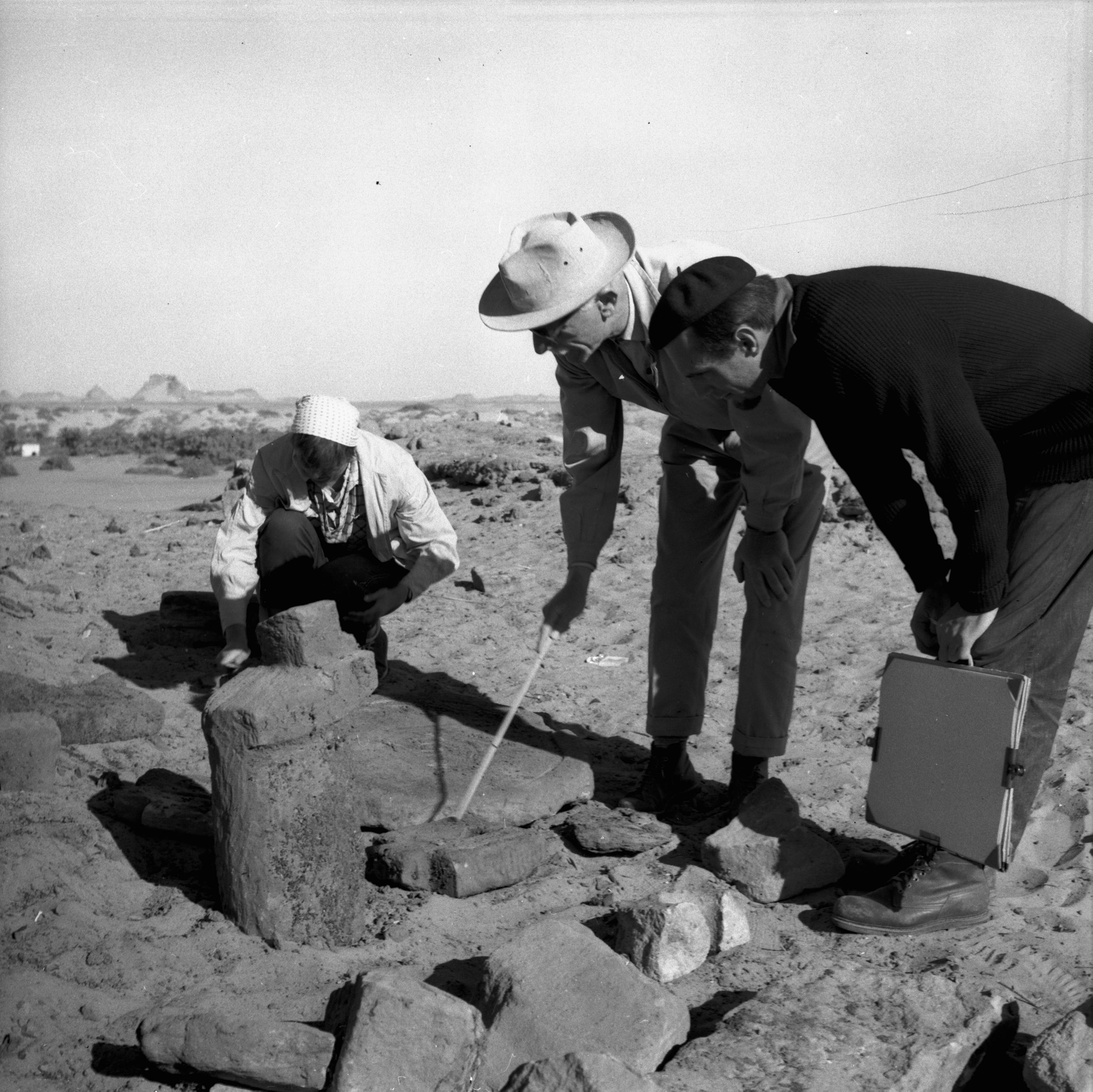 Wykopaliska w Faras. Na zdjęciu m.in. prof. Kazimierz Michałowski